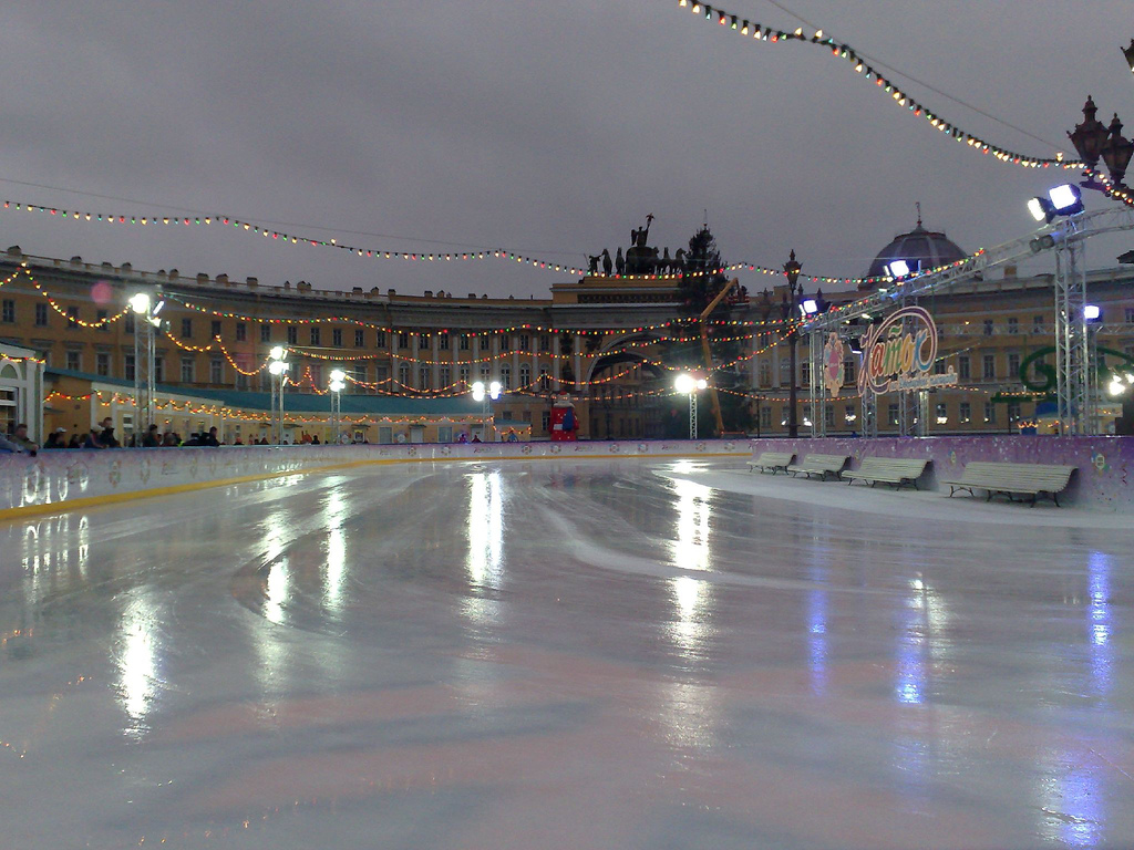 Rink In St Petersburg. December 2007